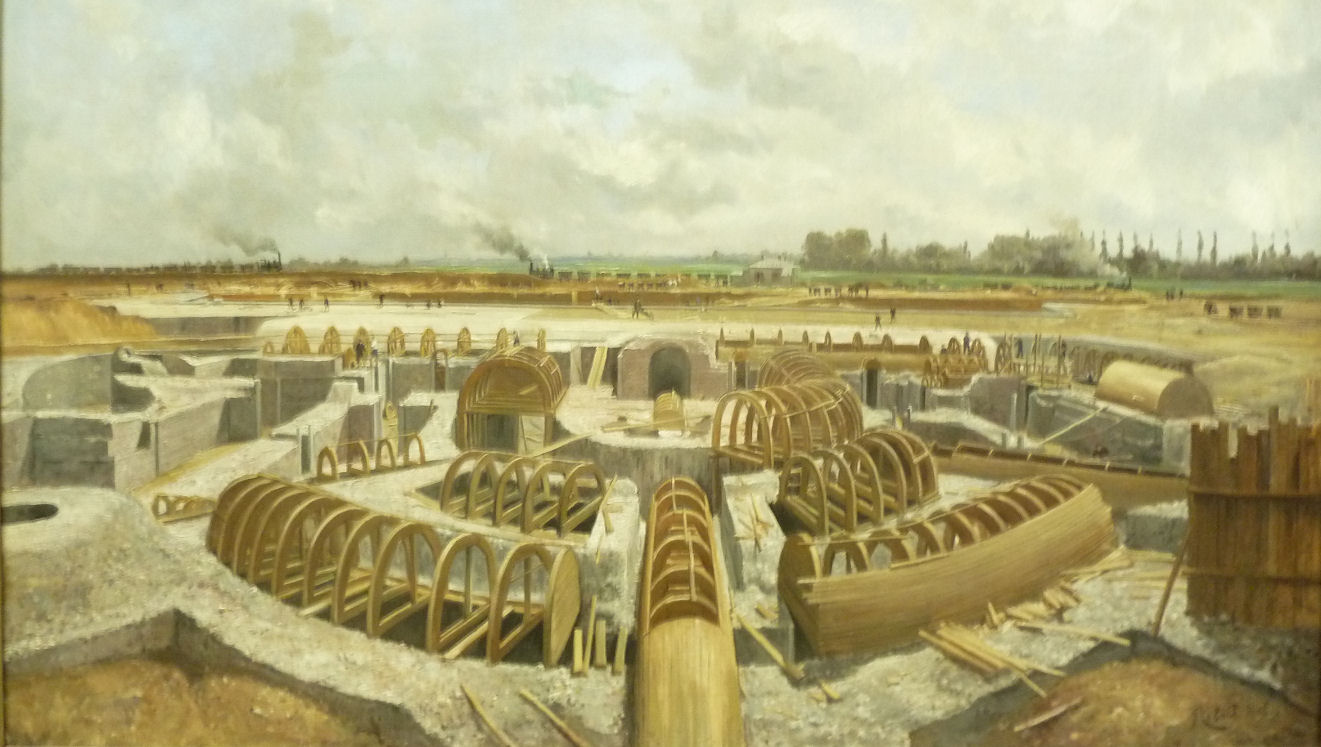 Koninklijk Legermuseum, historische zaal. Fortenbouw